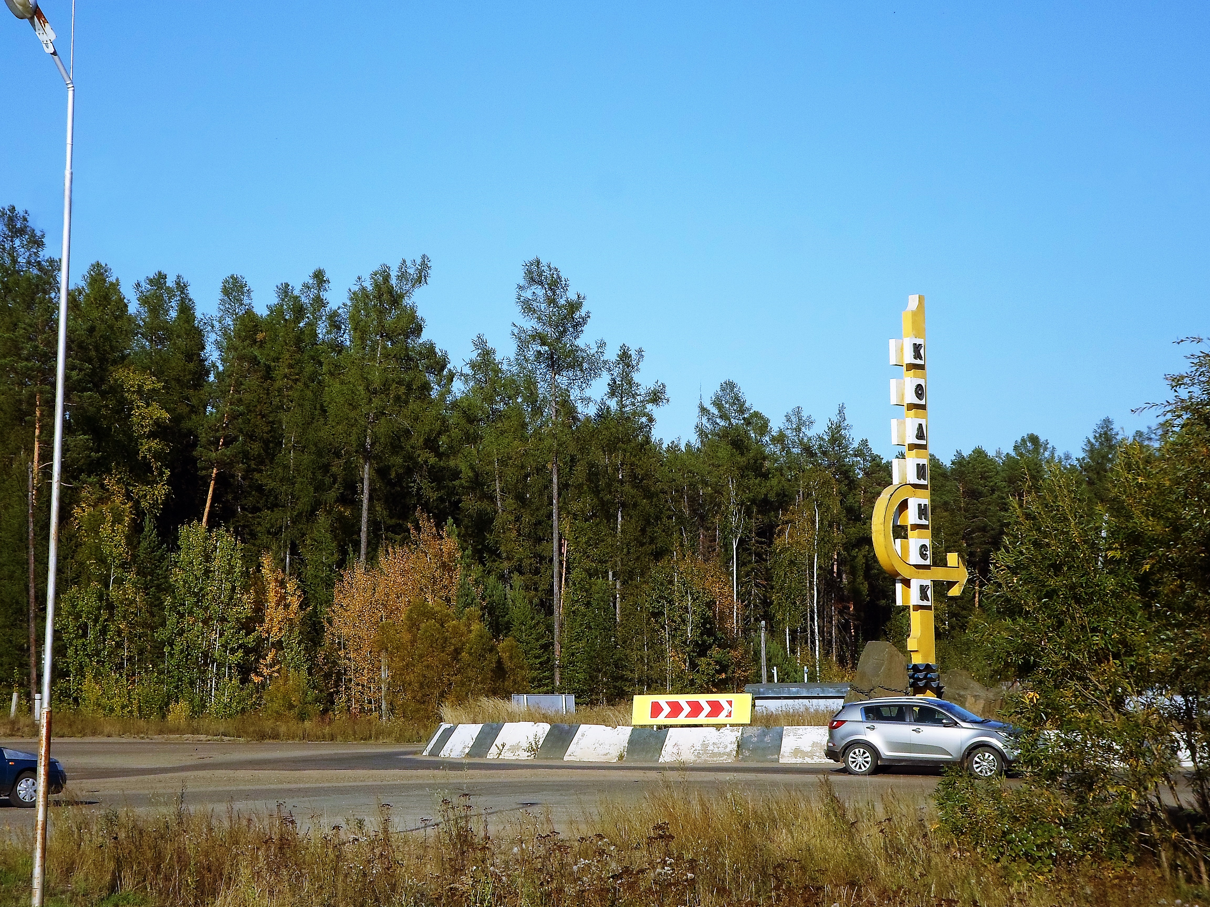 Город Кодинск, Кежемский район Красноярского края.